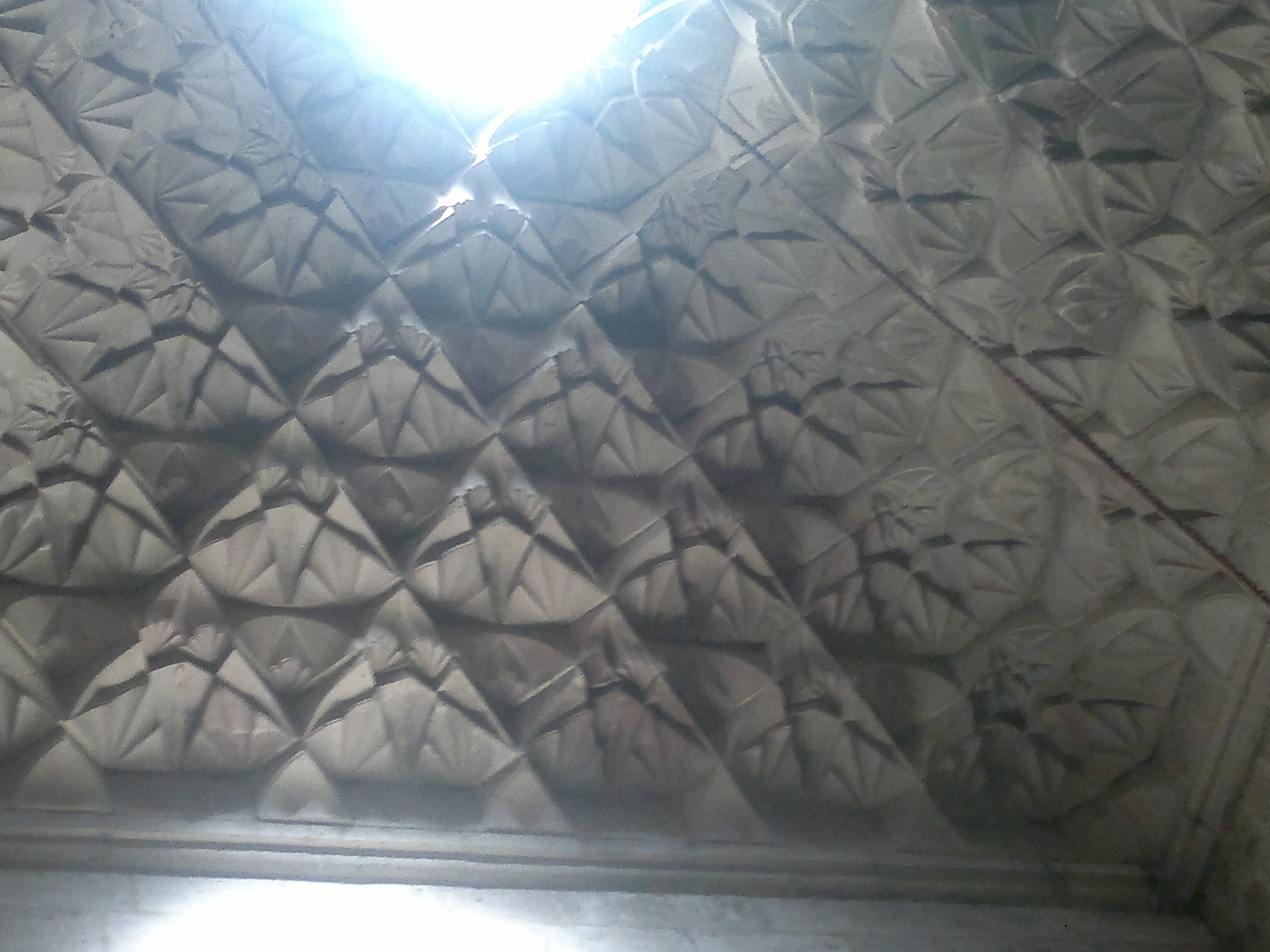 Erzurum Ulu Camii Mukarnas kubbe iç görünümü